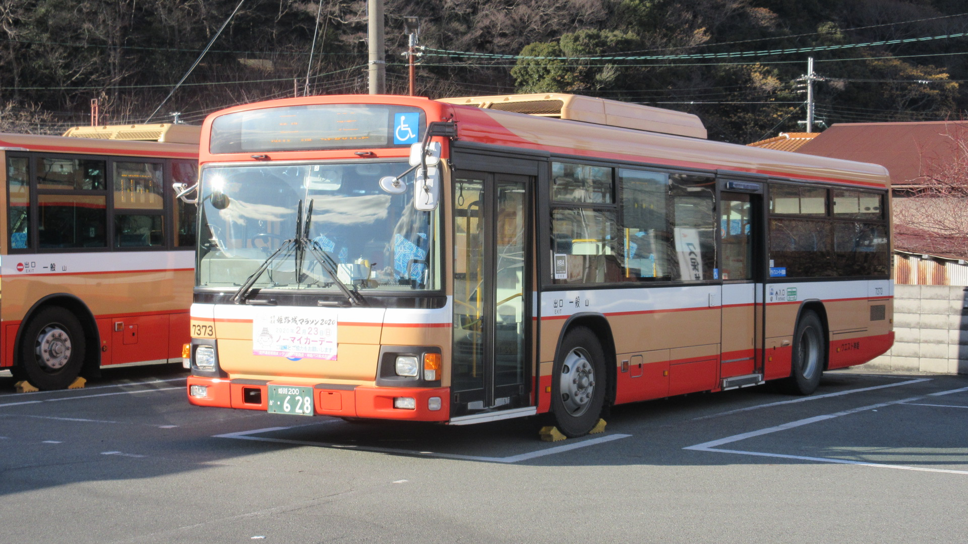 ウエスト神姫 山7373（龍野バスのりば） ※ 立入可能区域より撮影しました